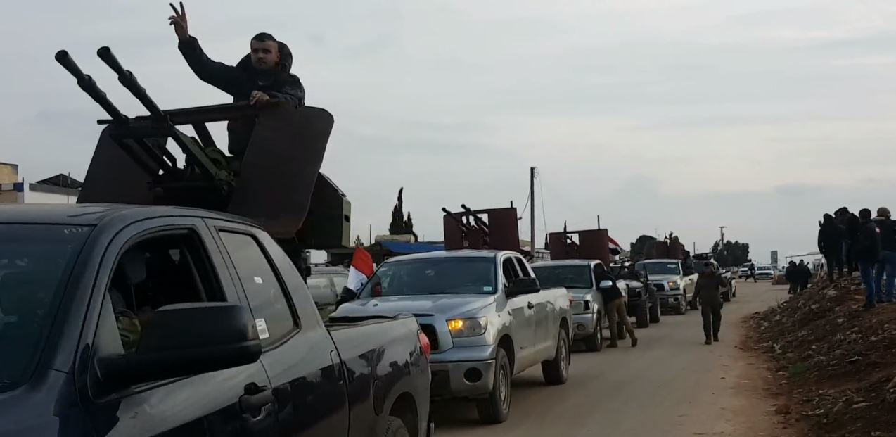 Entrée de milices pro-régime syriennes à Afrine le 20 février 2018.